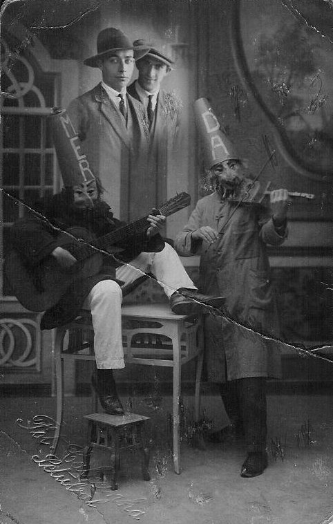 Mário Nascimento e Idalécio Cabecinha, setubalenses de mérito.